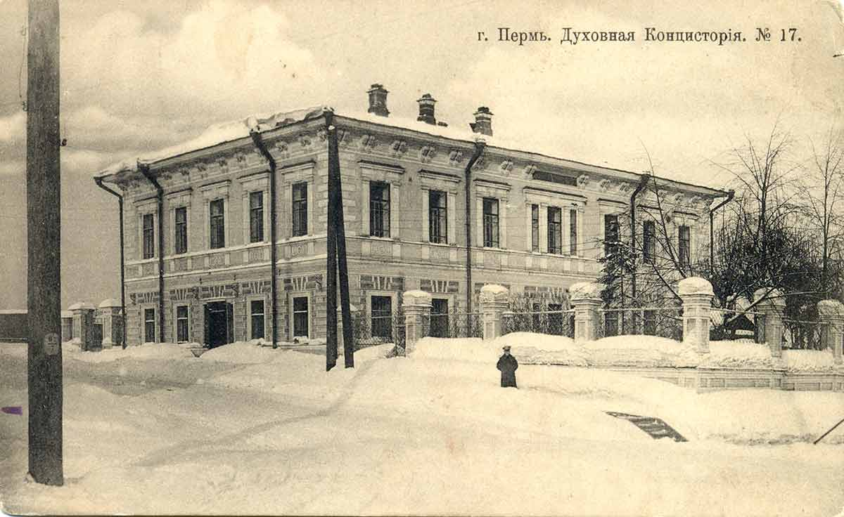 Пермская Духовная Консистория